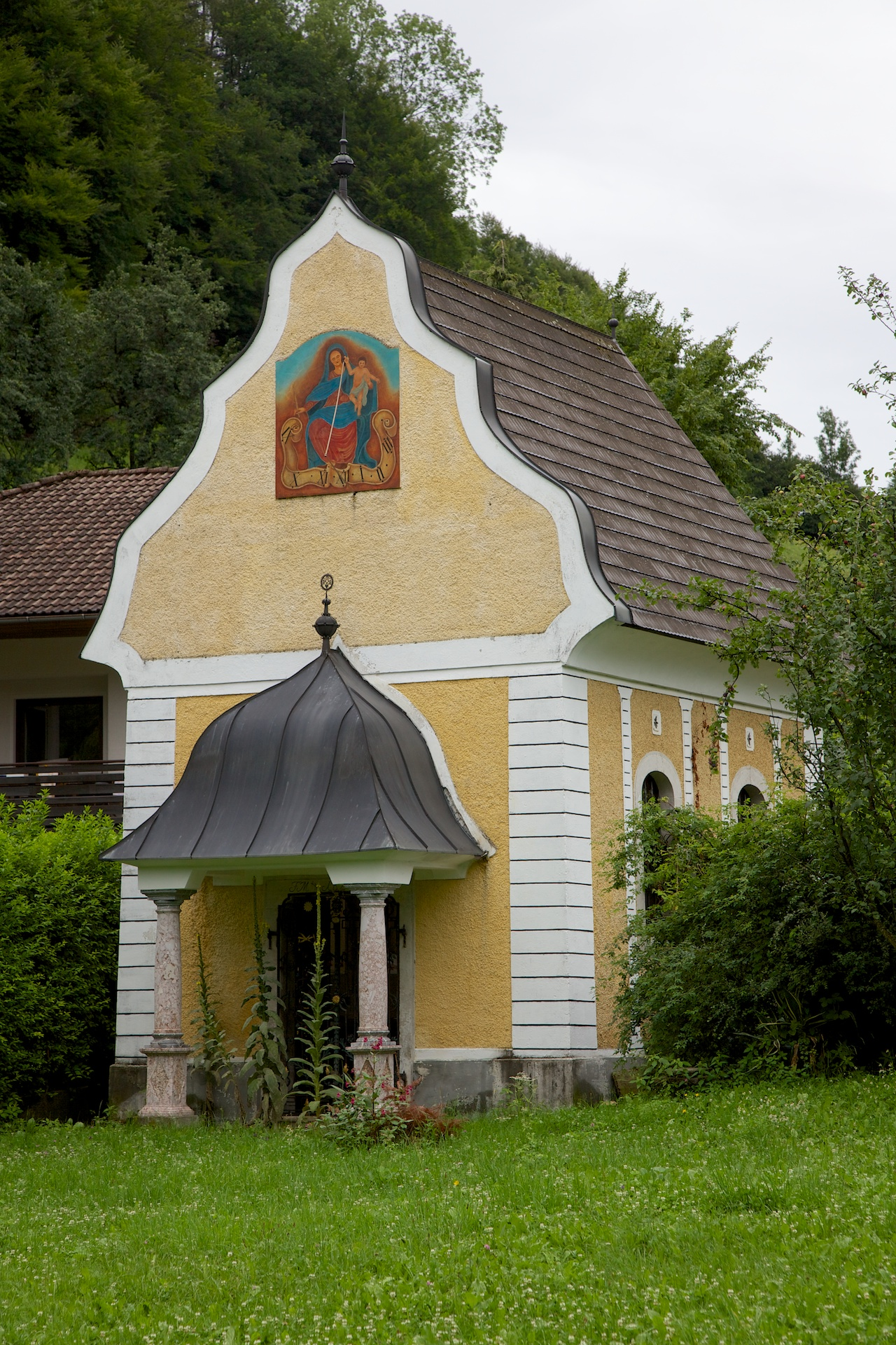 Hofkapelle, Sensenschmied-Kapelle, Kapelle hl. Johannes Nepomuk, Haindl-Kapelle